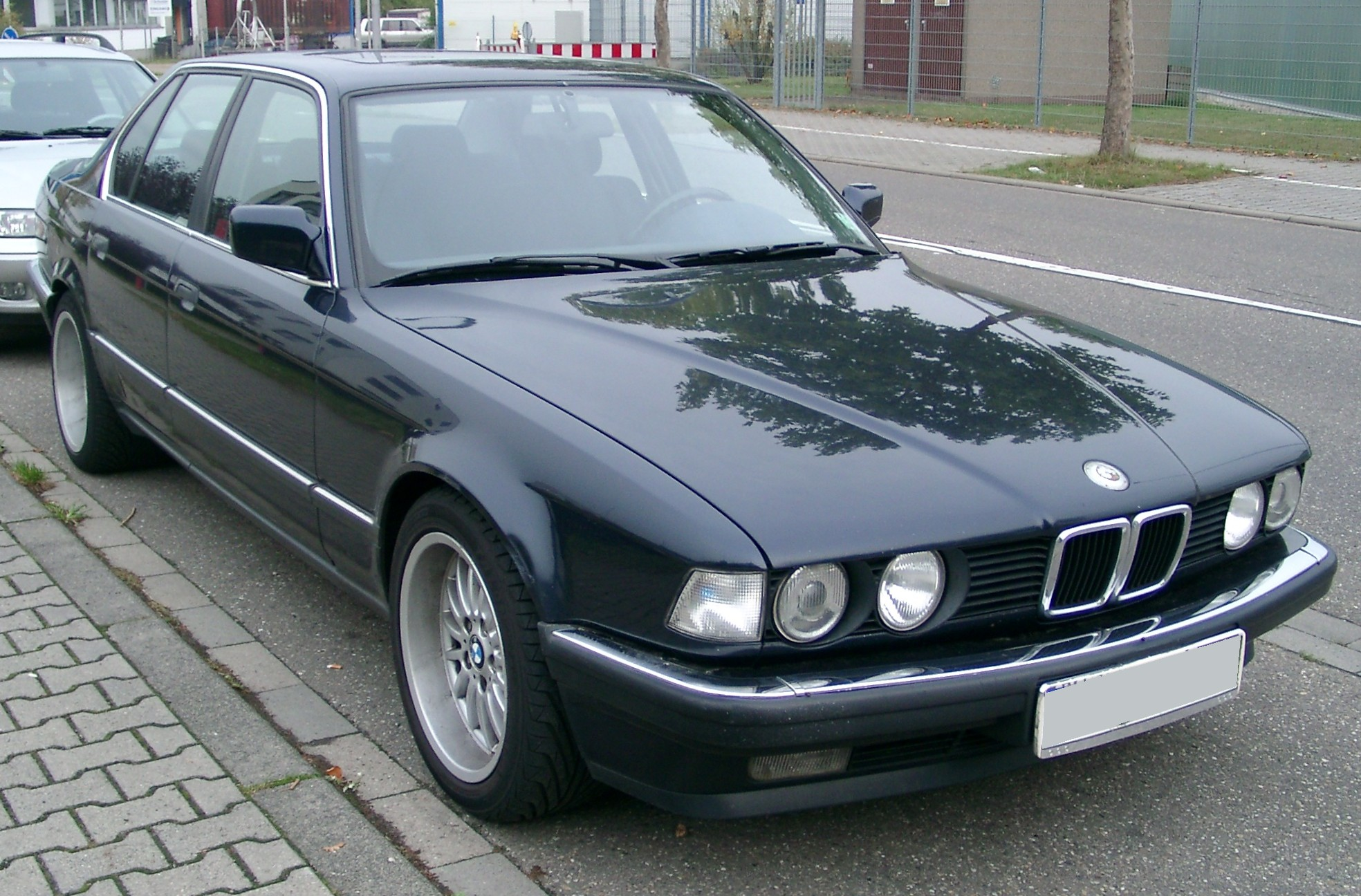 BMW E32 (730i)